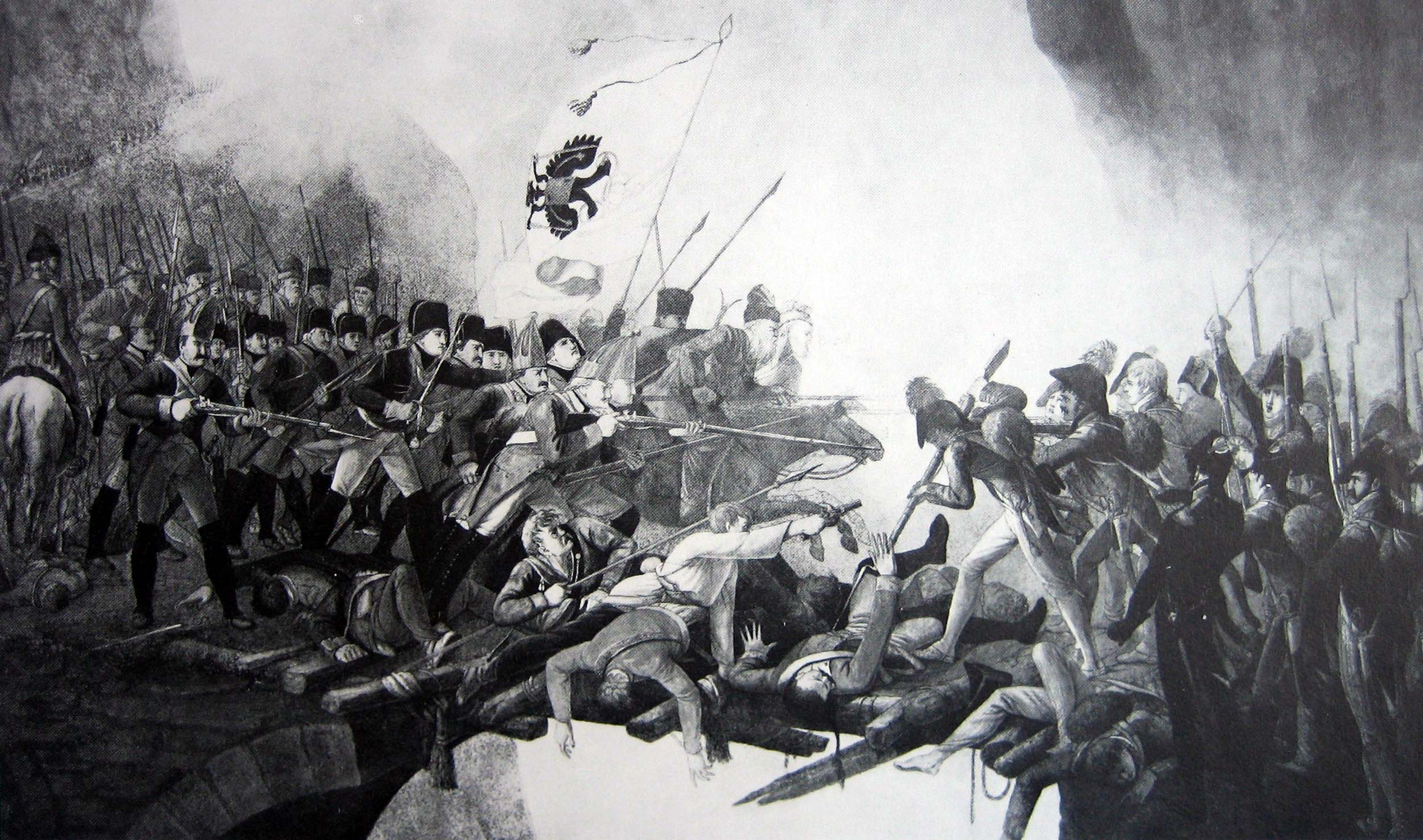 25. Sept. 1799, Schlacht bei der Teufelsbrücke zwischen Franzosen (re) und Russen (li). Radierung, 1800